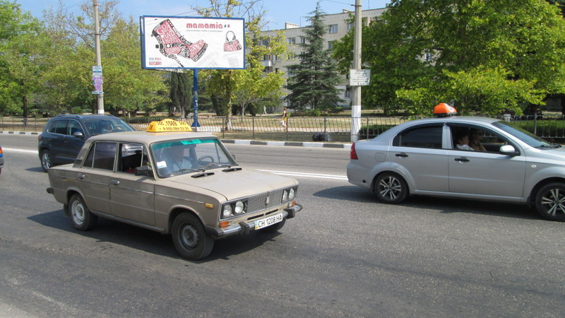 Севастопольське таксі